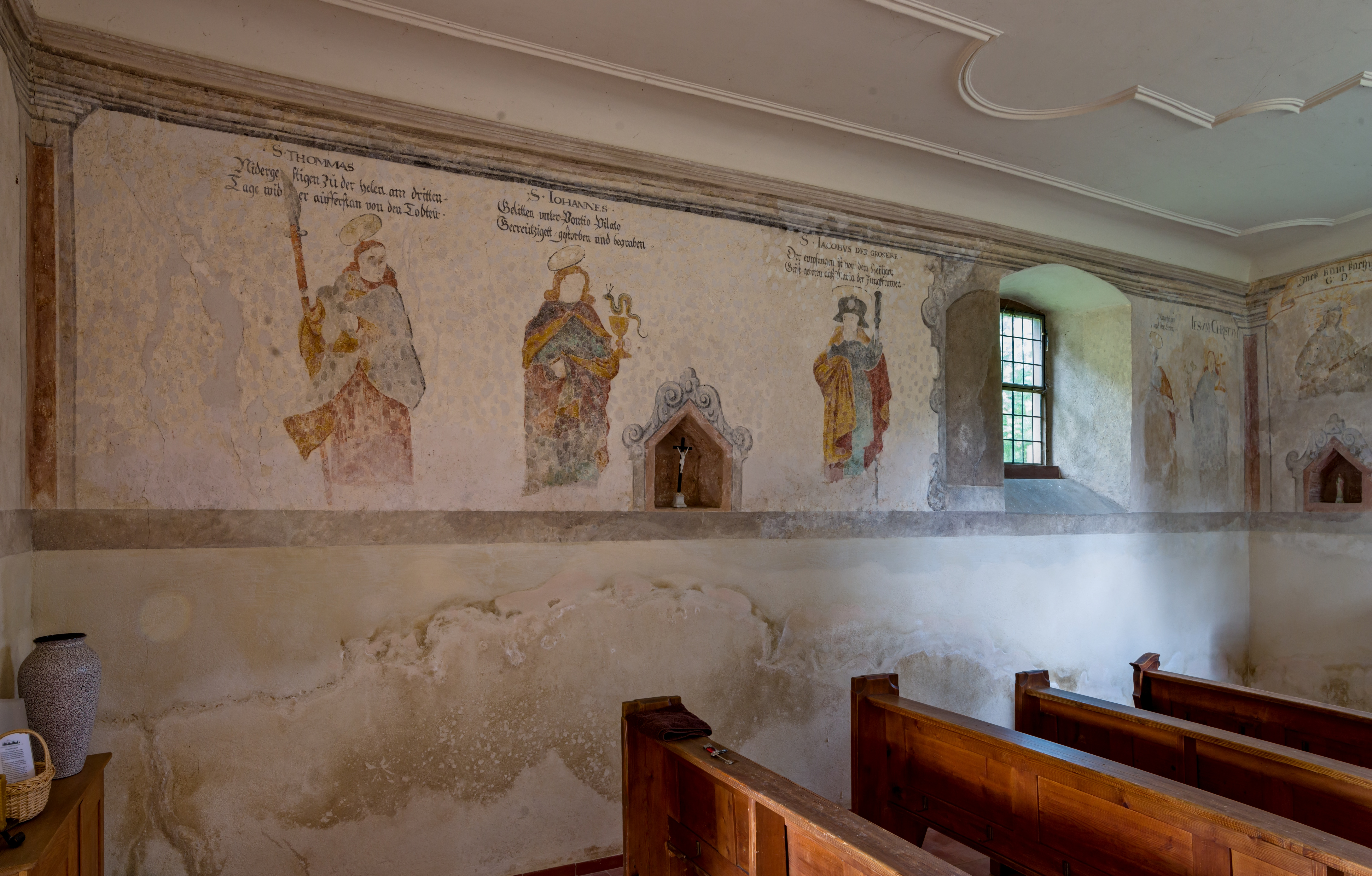 Bilder aus Staufen im Breisgau, die St. Magdalenenkapelle